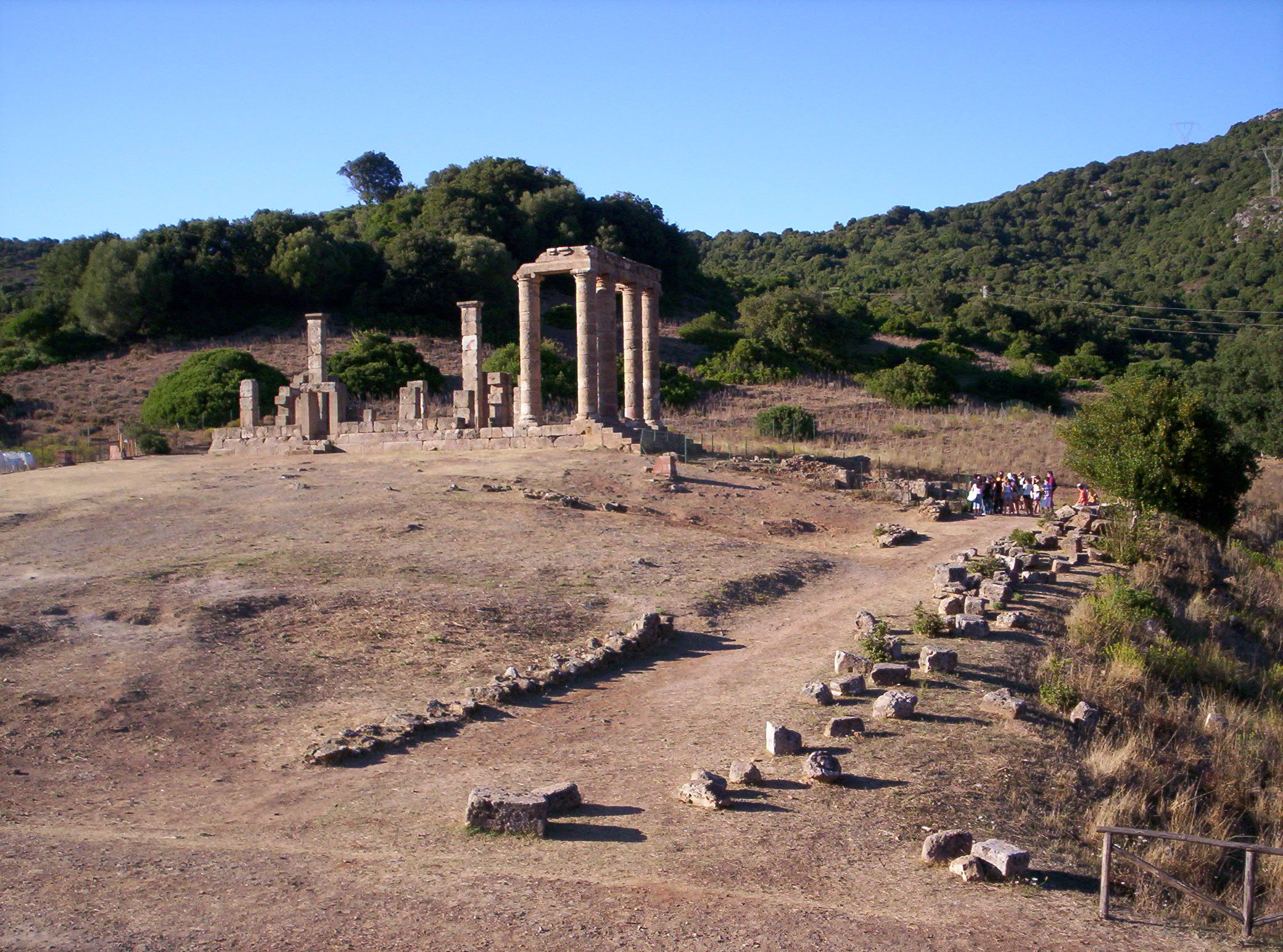 Tempio di Antas, Fluminimaggiore, Sardegna, Italy